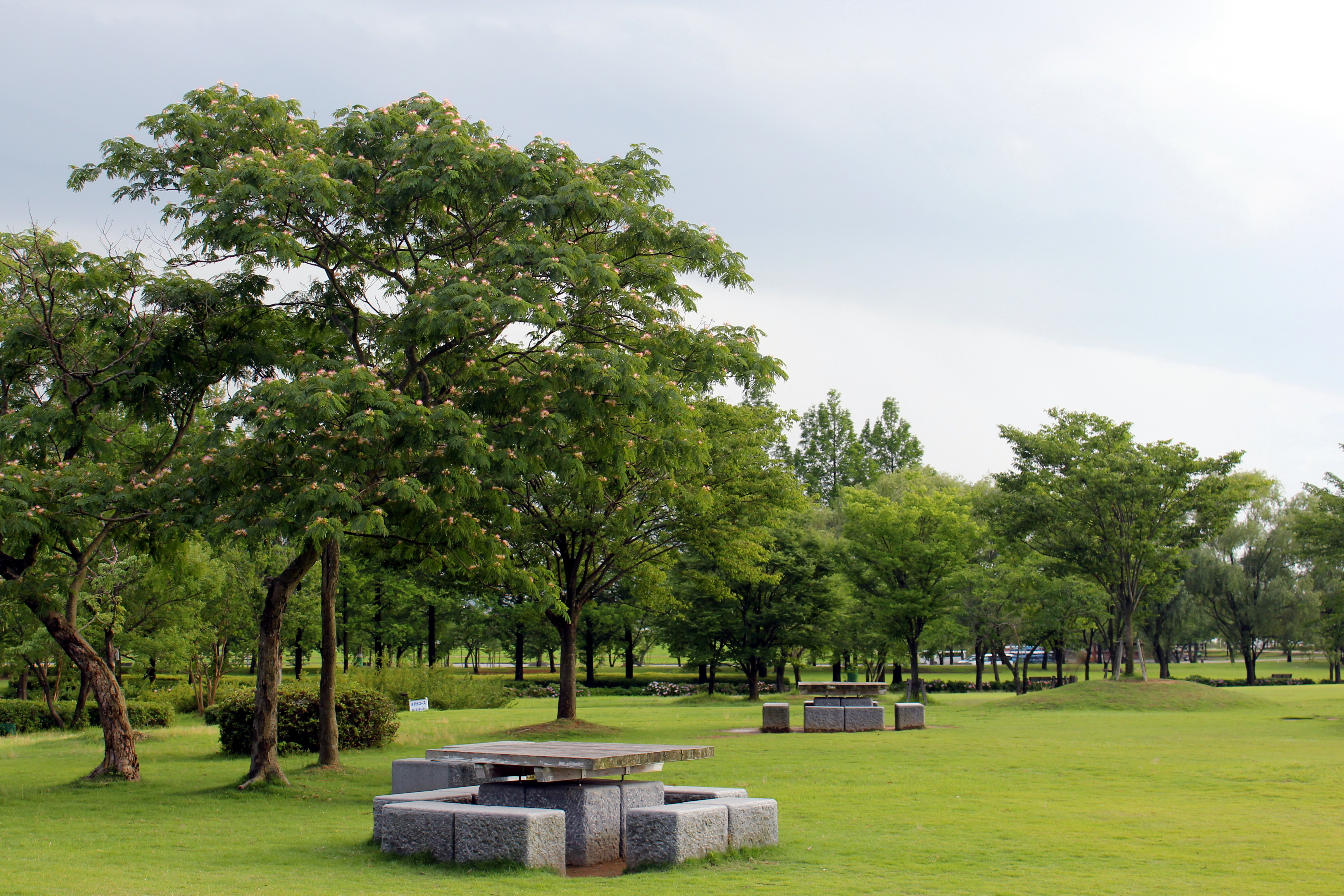 石川県木場潟公園（中央園地）